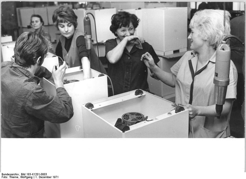 ADN-ZB-Thieme-1.12.71-Karl-Marx-Stadt: Ihren Ehrentag haben Edeltraud Zaro (vorn) und Margot Pester von der Abteilung Endmontage der Haushaltwäscheschleuder des VEB Erste Maschinenfabrik Karl-Marx-Stadt. Anläßlich der 750 000. Haushaltwäscheschleuder wurde ihr Kollektiv ausgezeichnet. Der Stammbetrieb des Kombinates für Plast- und Elastverarbeitungsmaschinen hatte die Produktion dieser "Hausgehilfen" im Jahre 1954 aufgenommen und damit der Forderung eines ZK-Plenums der SED nach mehr Massenbedarfsgütern entsprochen. Nach Beginn in mühseliger Handarbeit wurde eine moderne Produktion im Fließbandverfahren entwickelt."